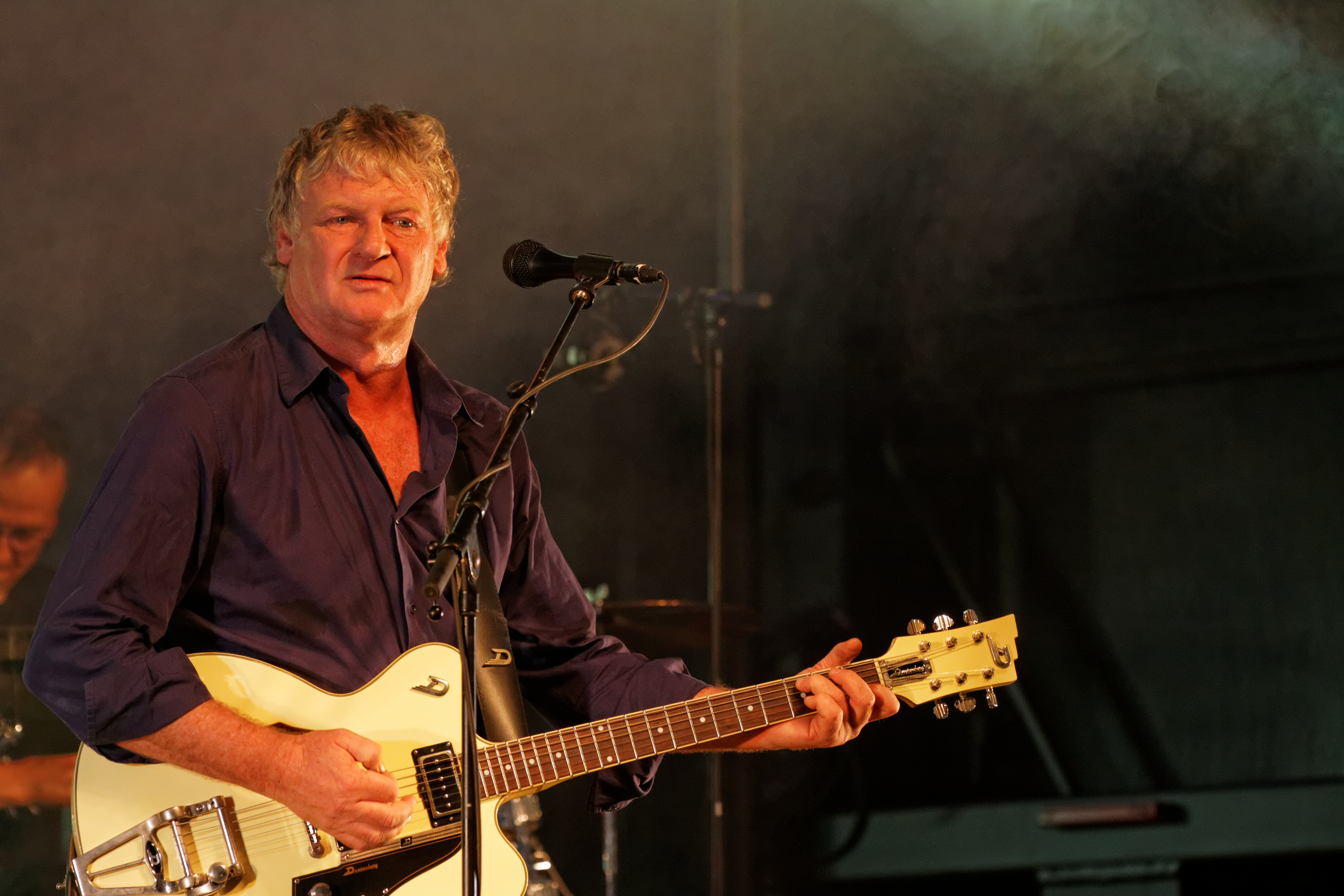 Rodolphe Burger en concert sur la scène Zebrock lors de la fête de l'Humanité 2012.